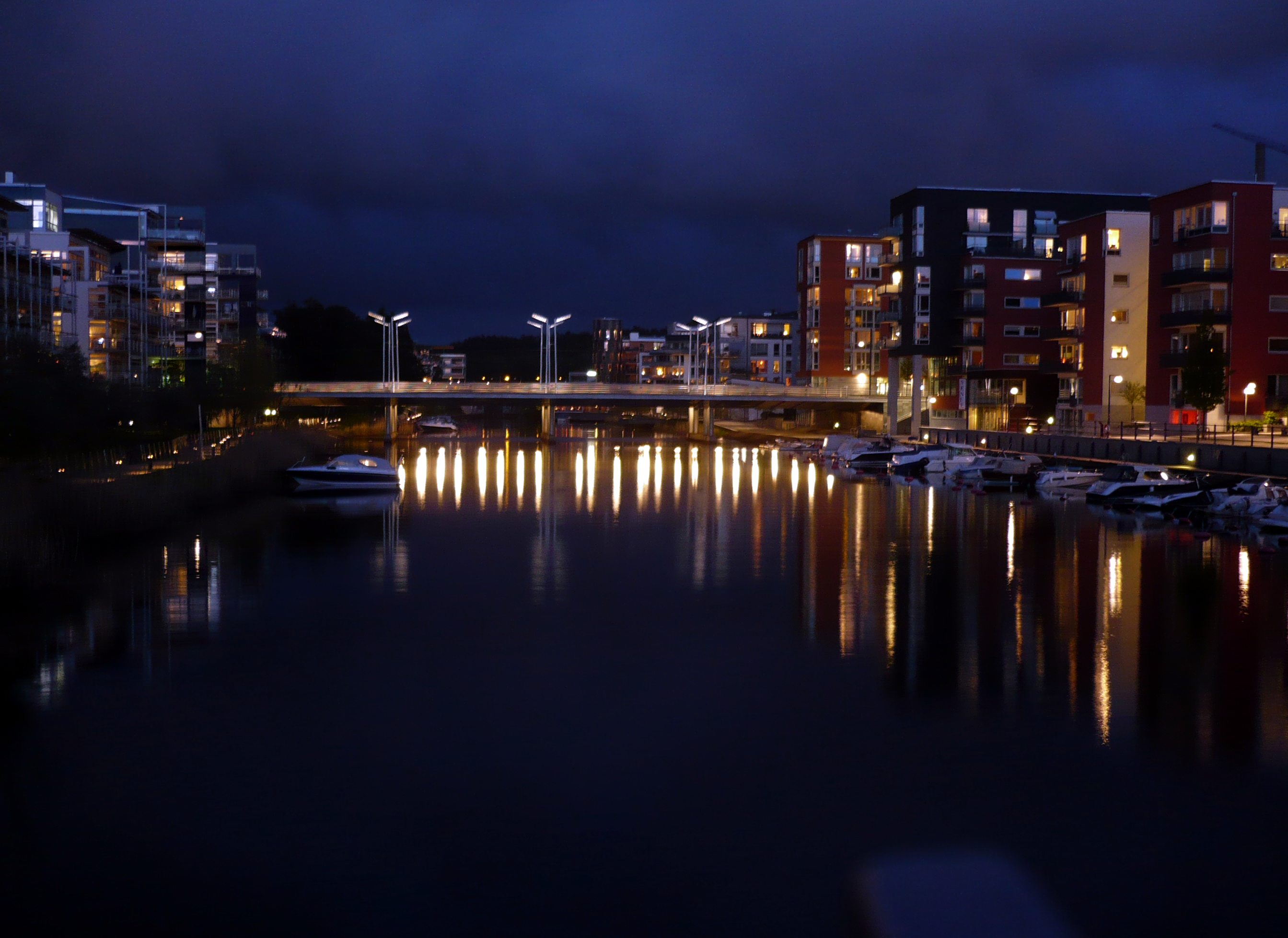 Allébron över Sickla Kanal i Hammarby Sjöstad i Stockholm.